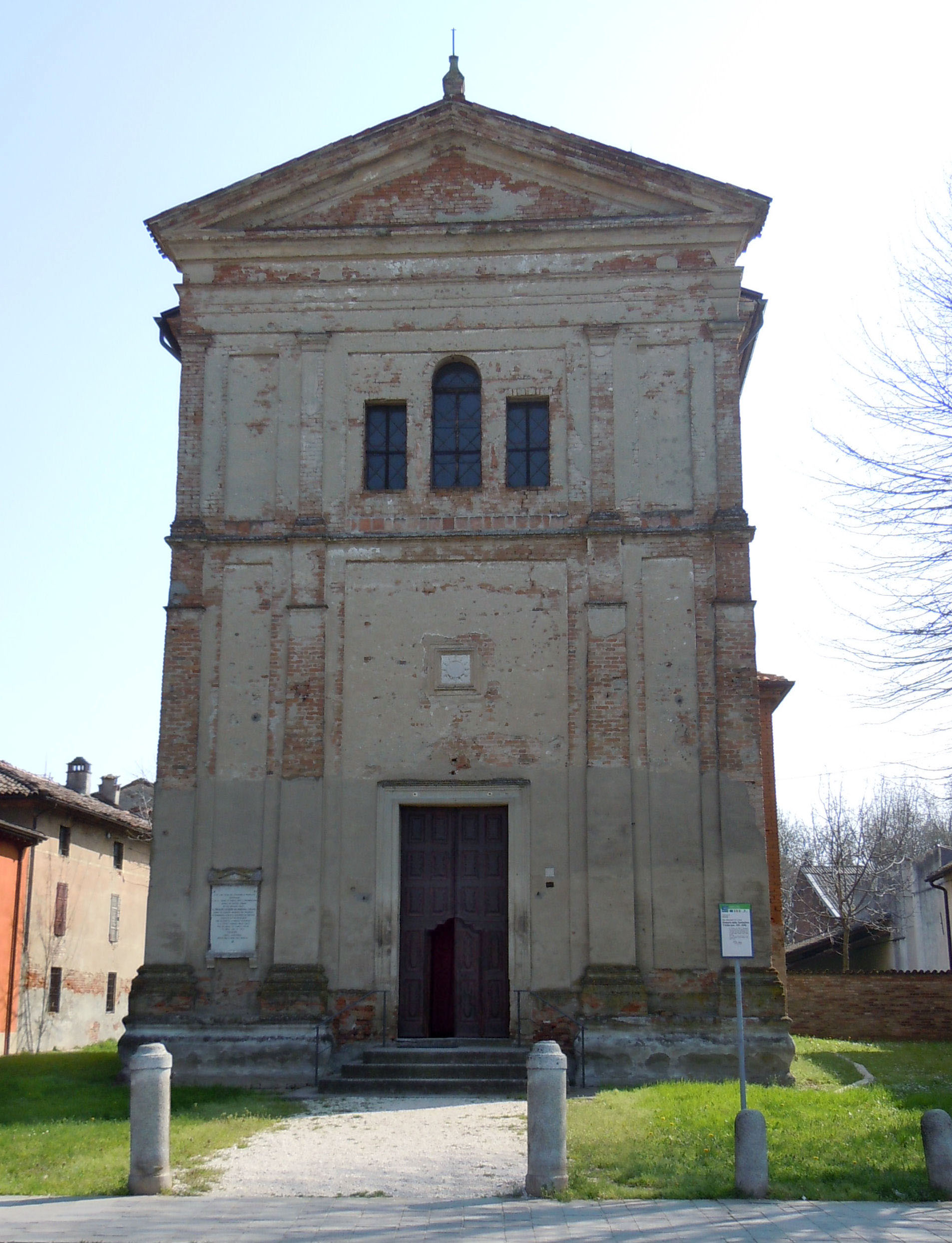 San Giovanni in Croce, Oratorio della SS. Trinità.